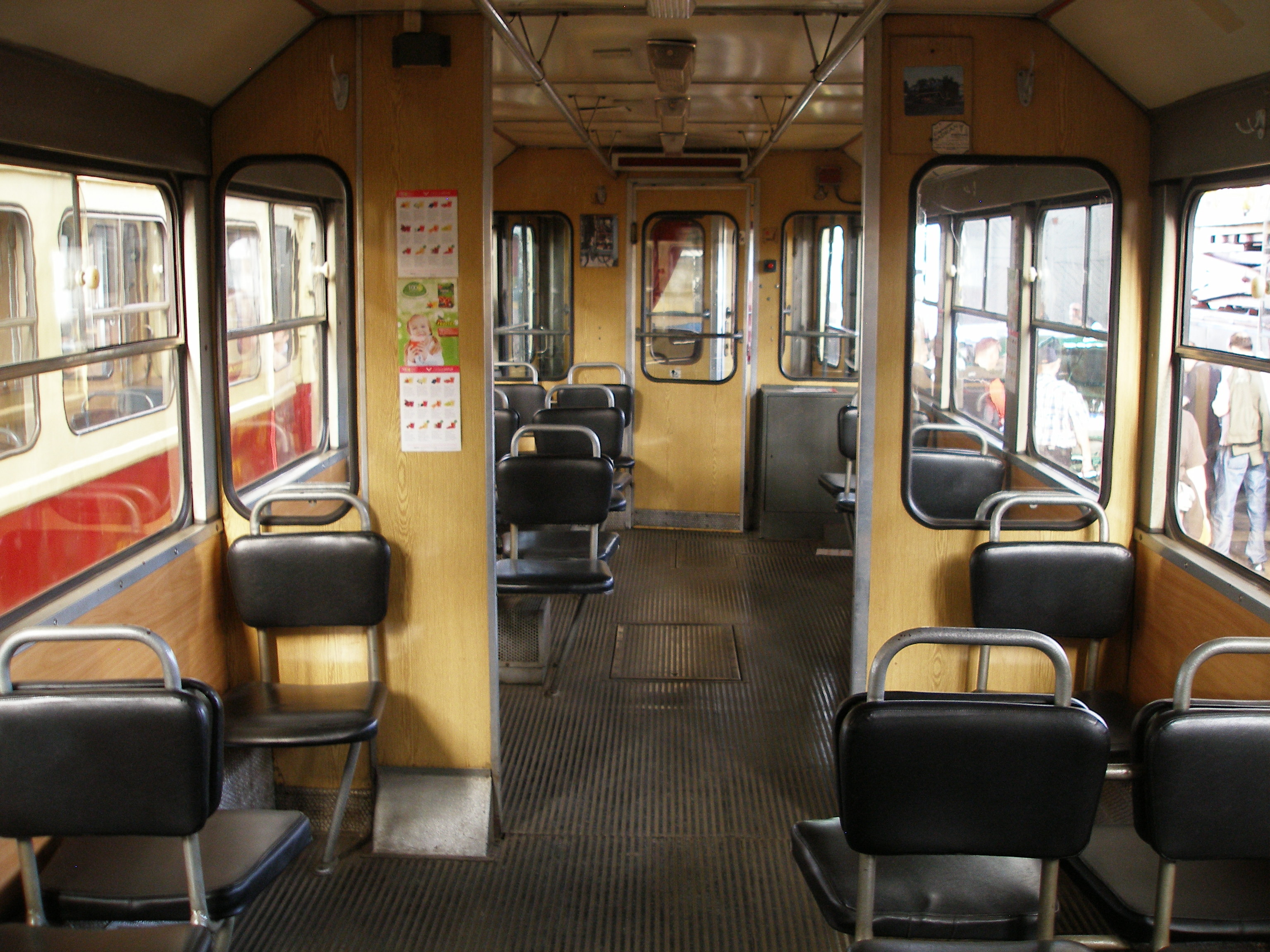 Interiér elektrická jednotka v depu Trenčianské elektrické železnice v Trenčianské Teplé.